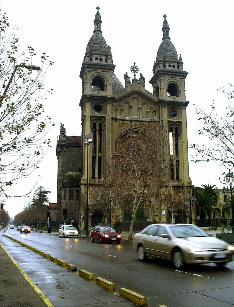 iglesia de los sacramentinos y su arte gótico, se intentaba llegar cada vez más alto, para estar más cerca del cielo. santiago, región metropolitana, chile.